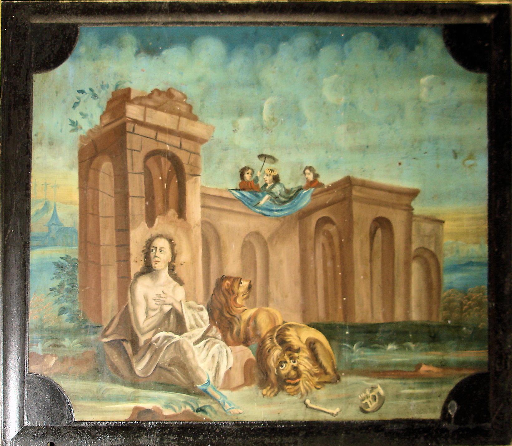 Kirche Lambrechtshagen, Empore Detail von 1759: Daniel bei den Löwen / Church in Lambrechtshagen, detail of the gallery